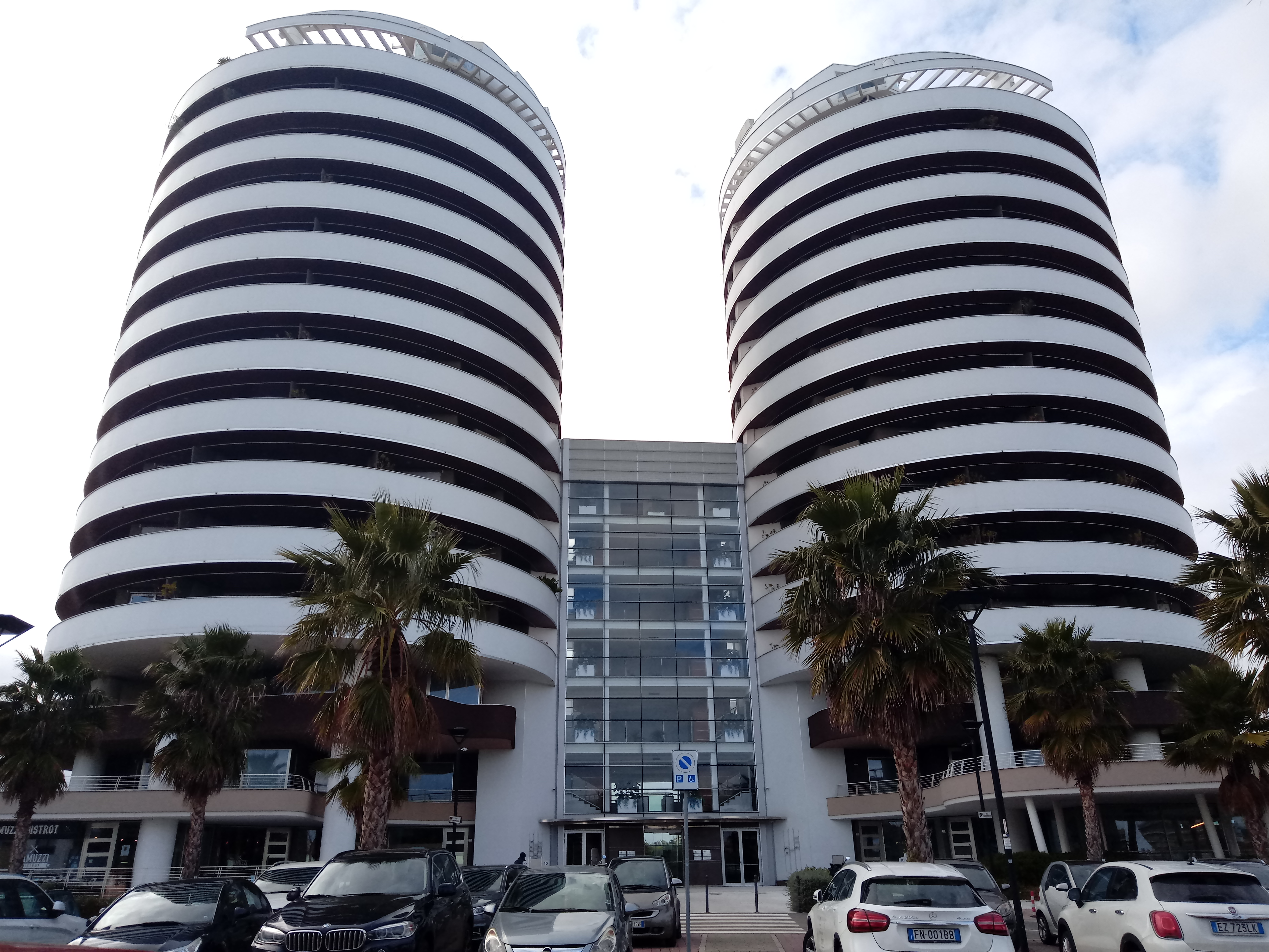 Immagine frontale delle Torri Camuzzi di Pescara